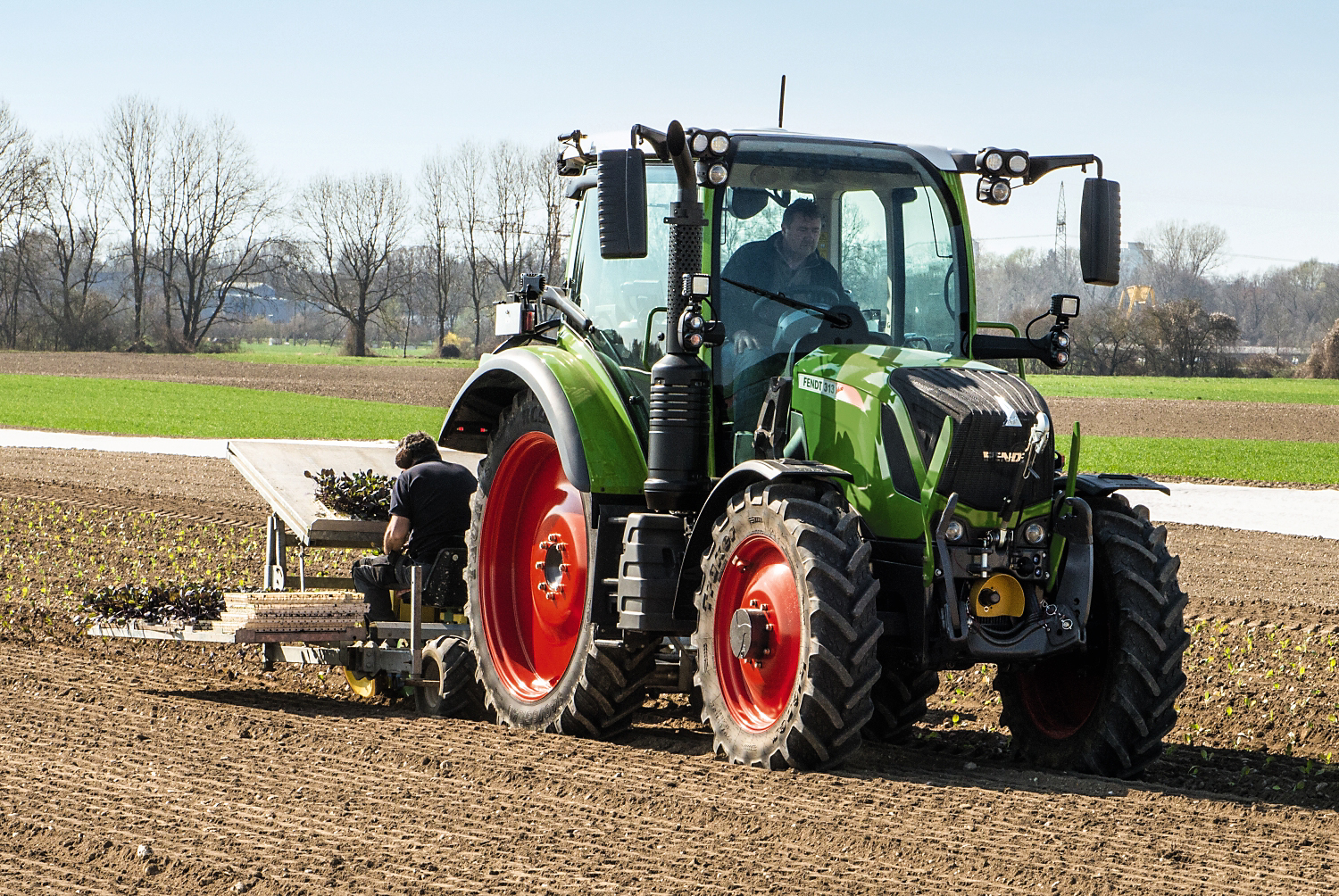 Fendt 300 Vario